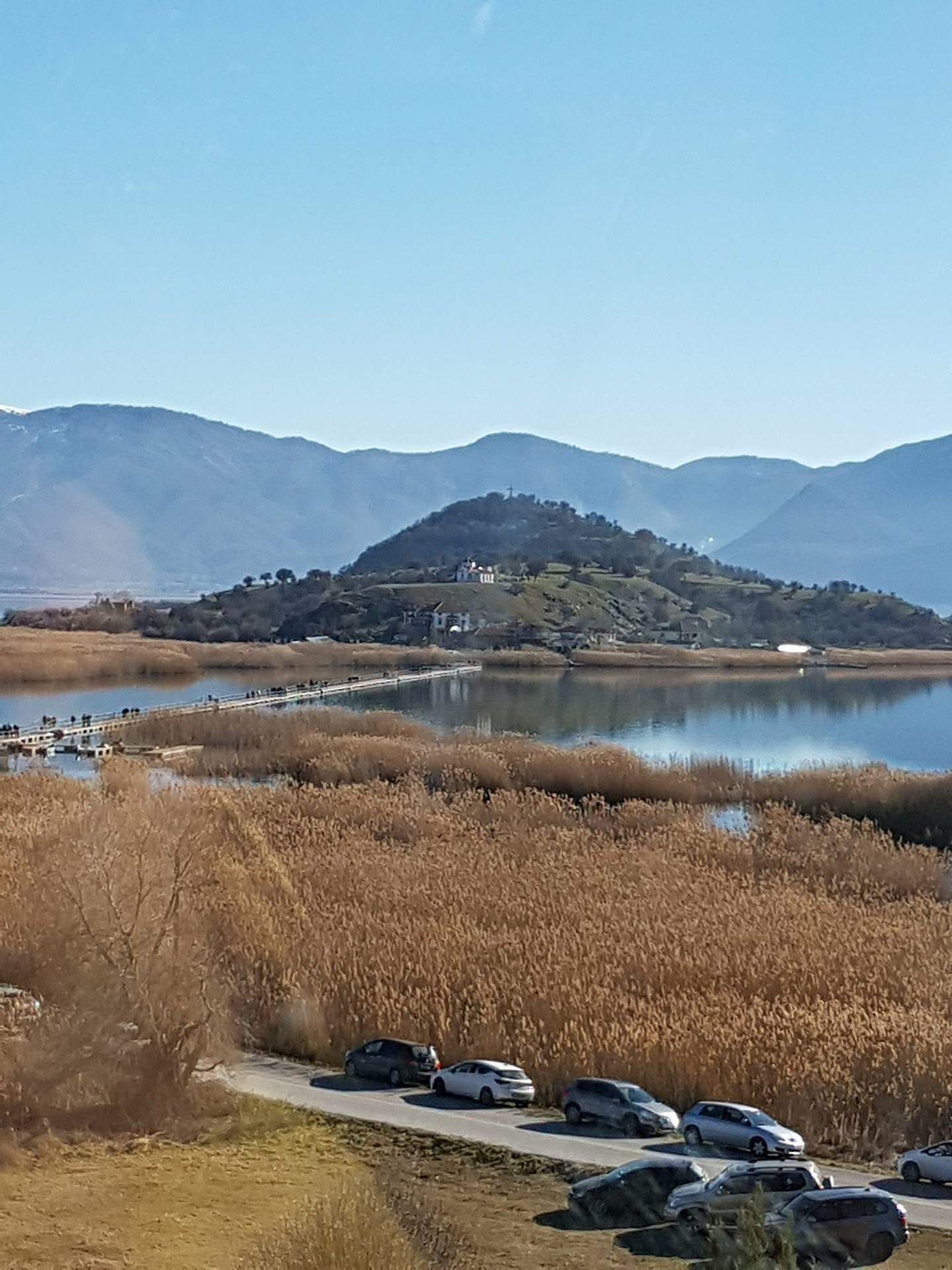 Το νησάκι του Αγ Αχιλλειου ενώνεται με ένα στενό διάδρομο με την ακτή της Πρέσπας This is a photography of Natura 2000 protected area with ID GR1340001